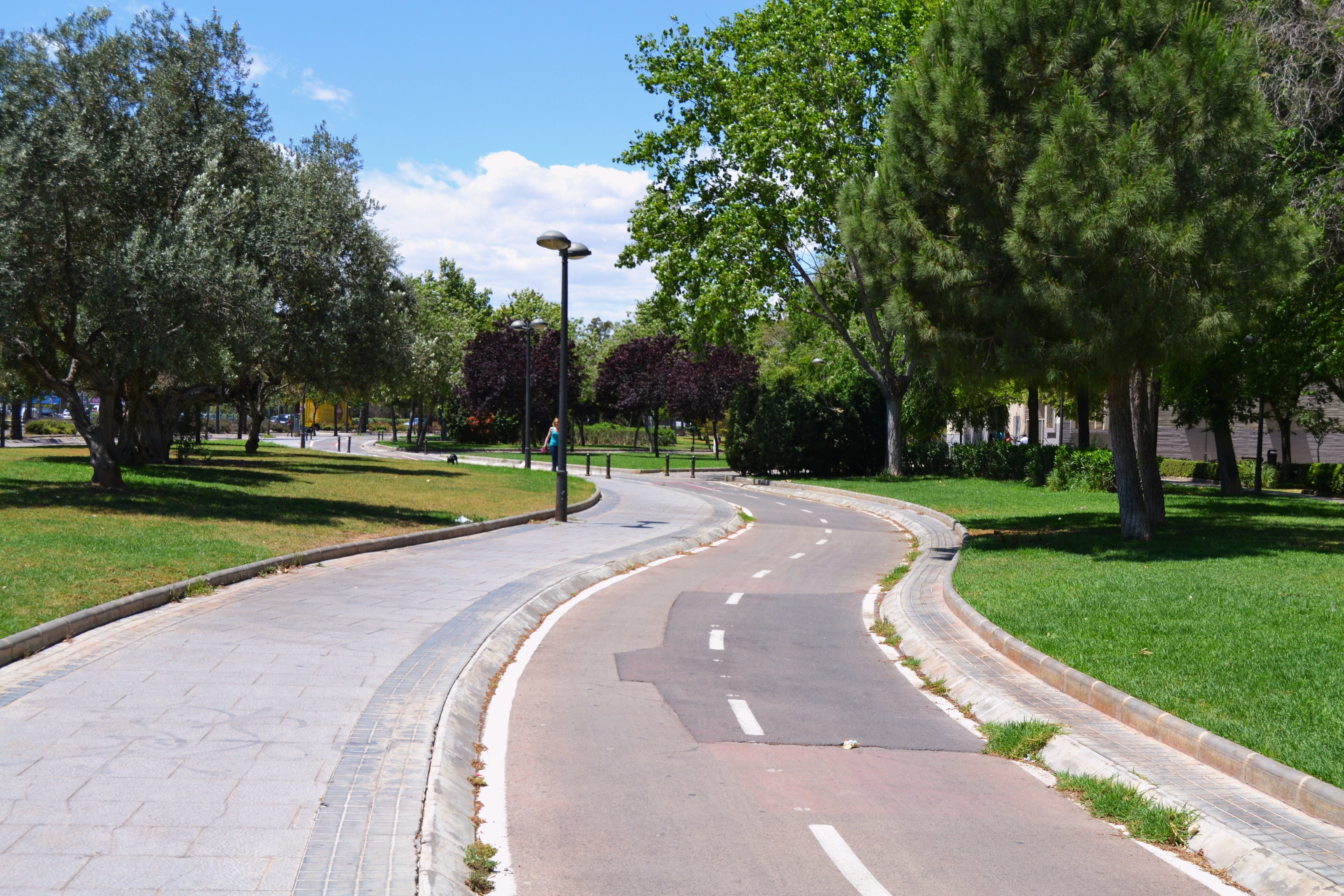 Carril bici al costat de l'avinguda de les Tres Creus, València.